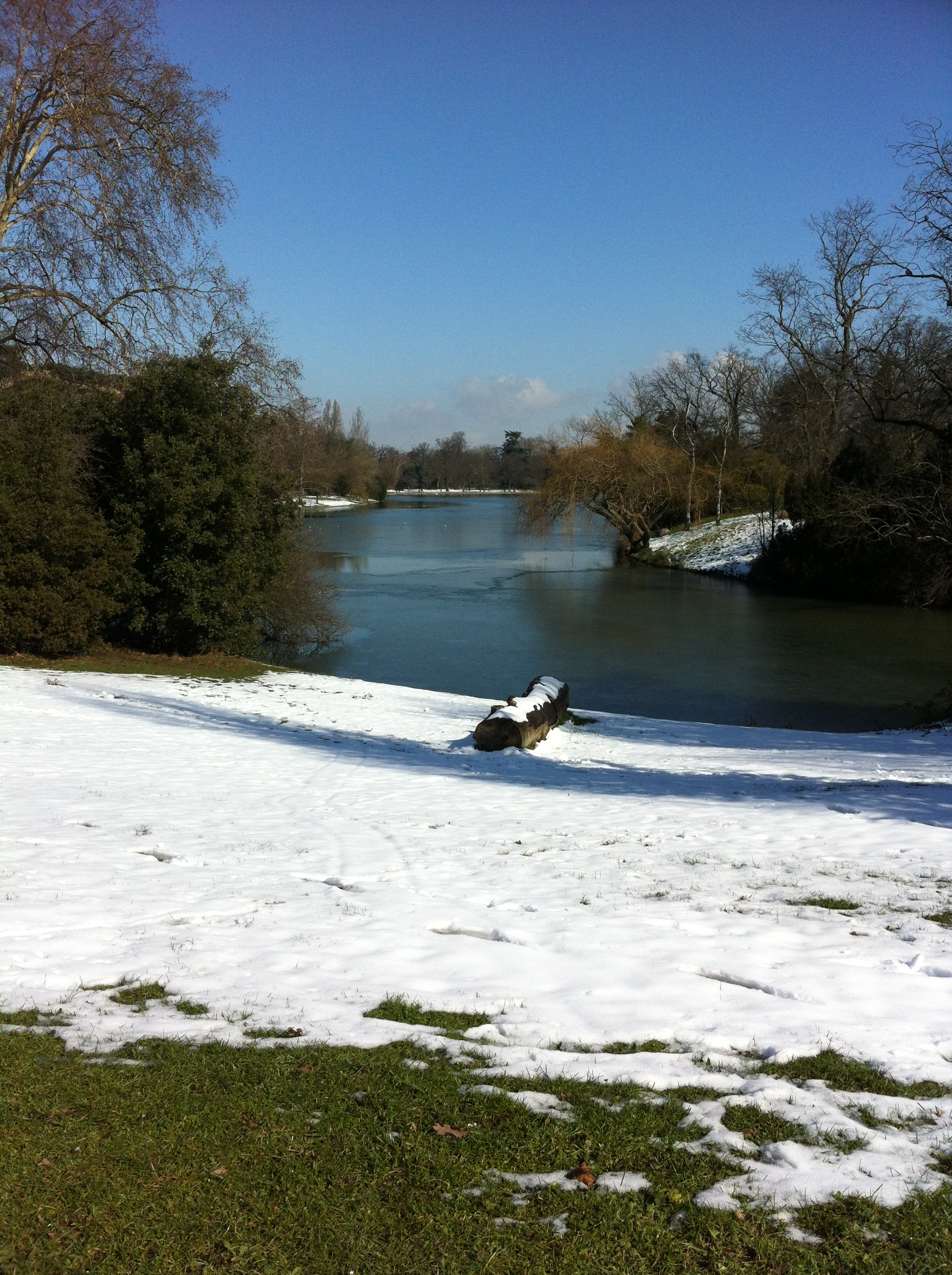 lac superieur paris france